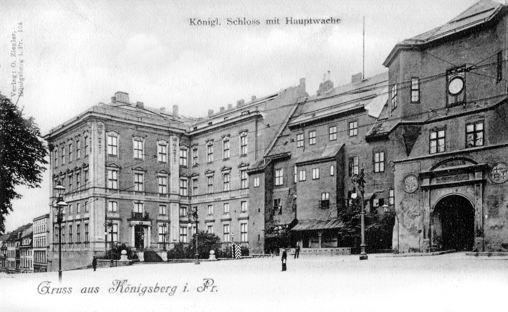 Hauptwache vor dem Königsberger Schloss